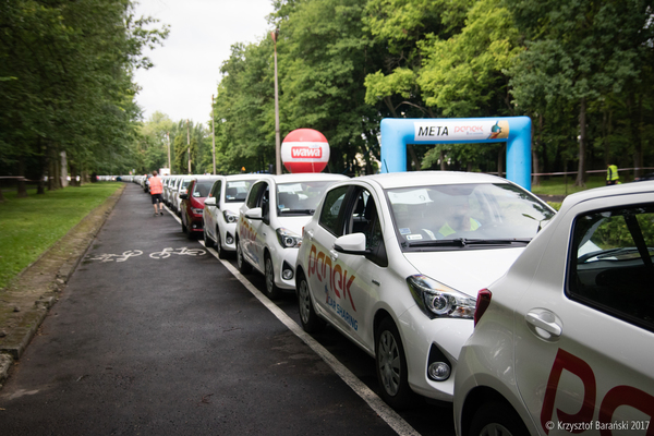 zdjęcia z bicia Światowego Rekordu Guinnessa